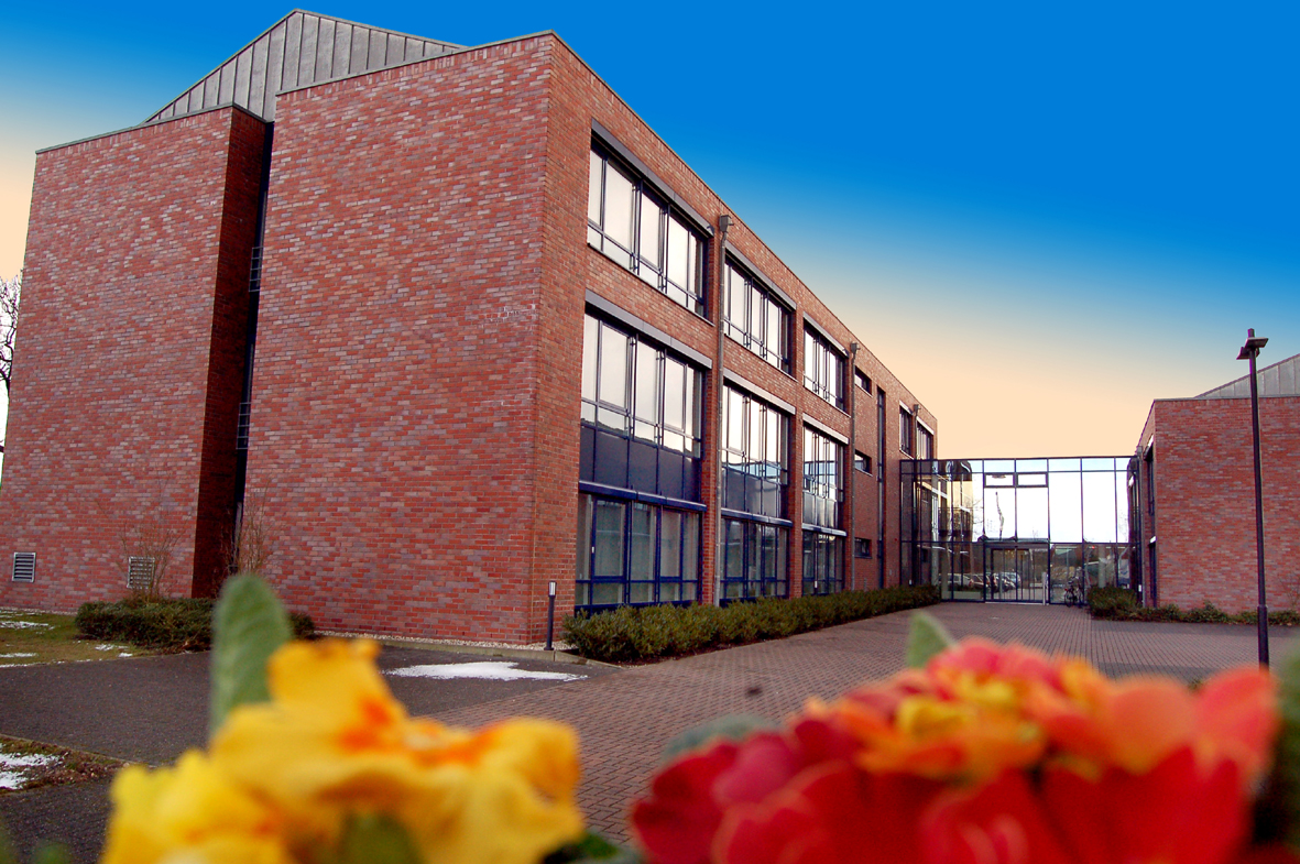 Abbildung: Verwaltungsgebäude der Volksbank an der Niers eG, Am Kapellhof 1, 47608 Geldern.